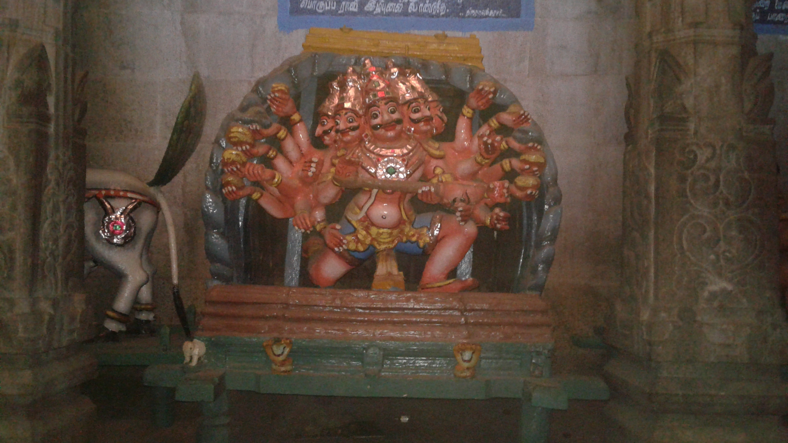 இராவணன் வாகனம் பராய்துறைநாதர்